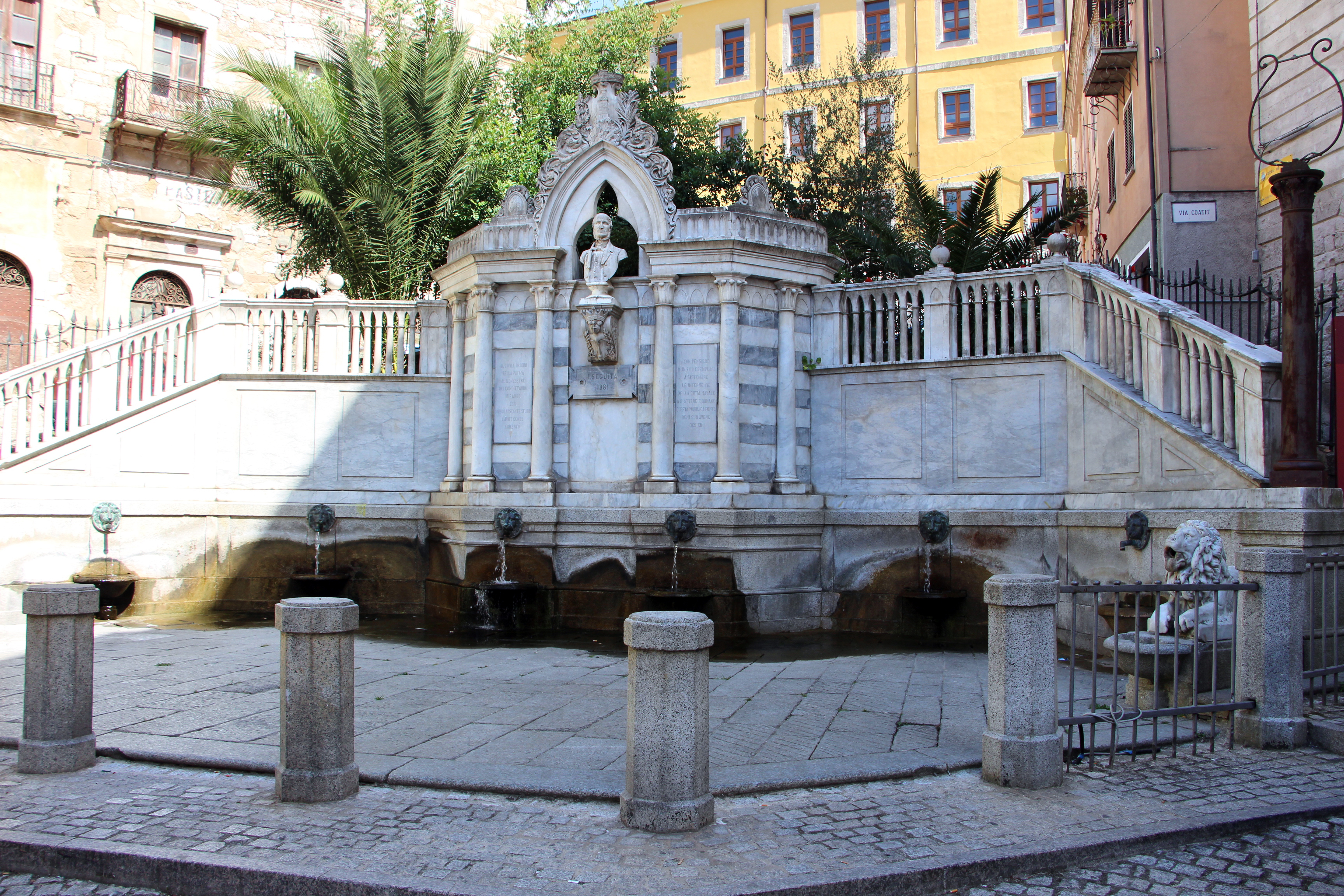 Ozieri